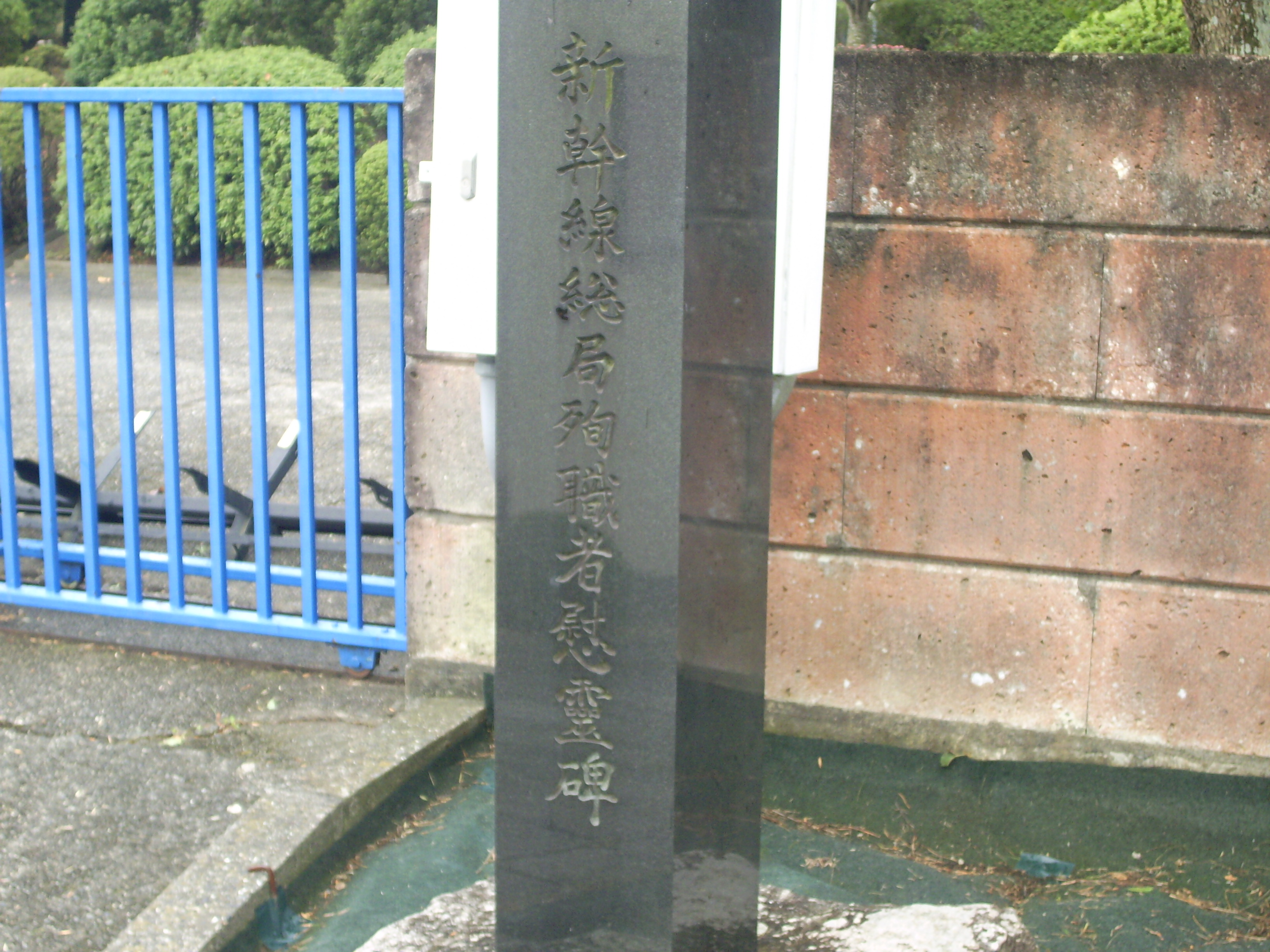 静岡県湖西市新居町中之郷の新幹線上り線脇にある東海道新幹線殉職者慰霊碑。本当の慰霊碑は敷地内にあり非公開だが、門扉前に石碑が建てられている ㊟カメラを起動すると日付機能が出荷時のものに初期化されるため、ファイル履歴の撮影日時とメタデータの原画像データの生成日時が異なります